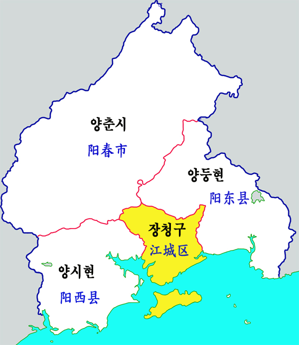 양장시 현급구역